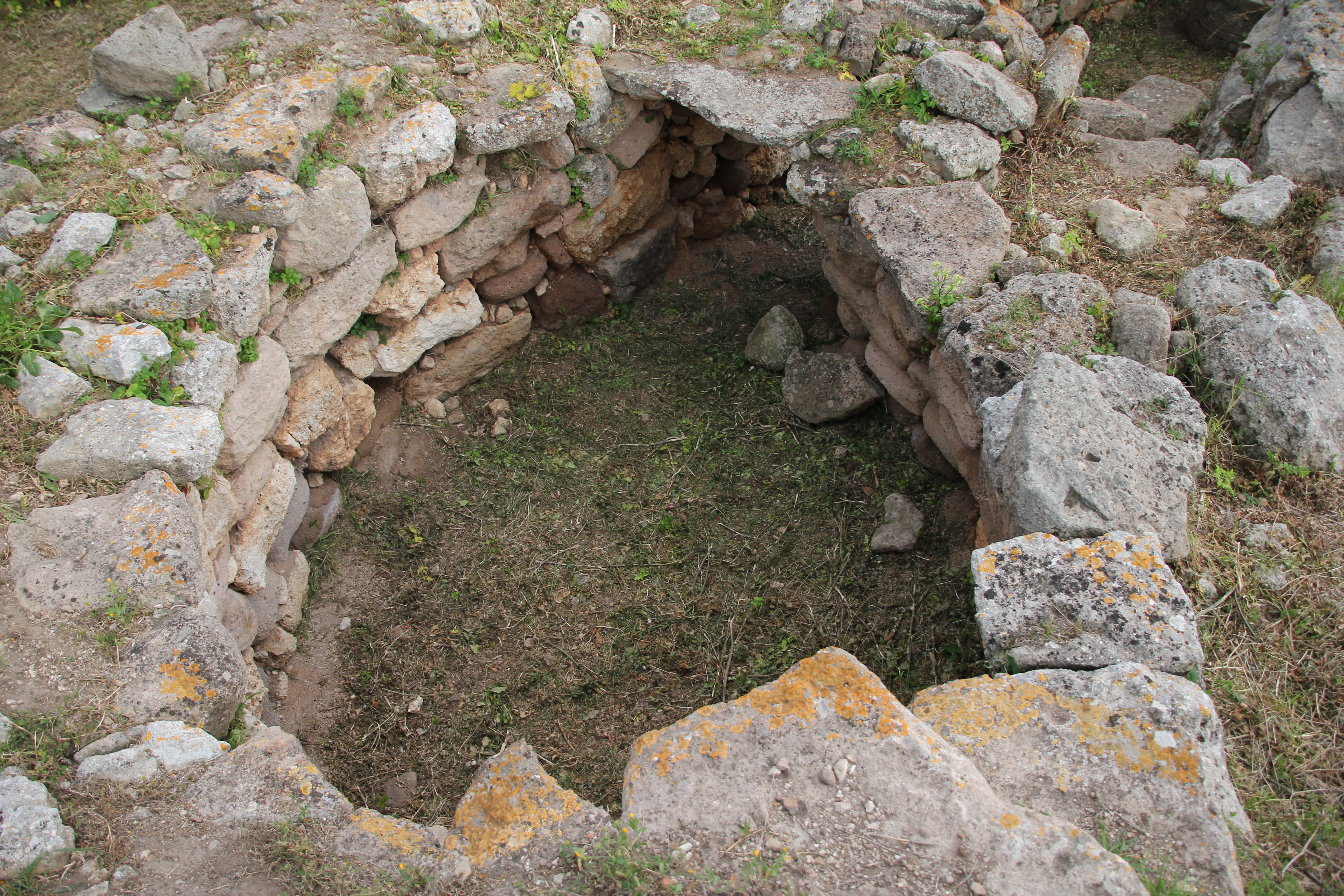 Uri, complesso nuragico di Santa Caterina